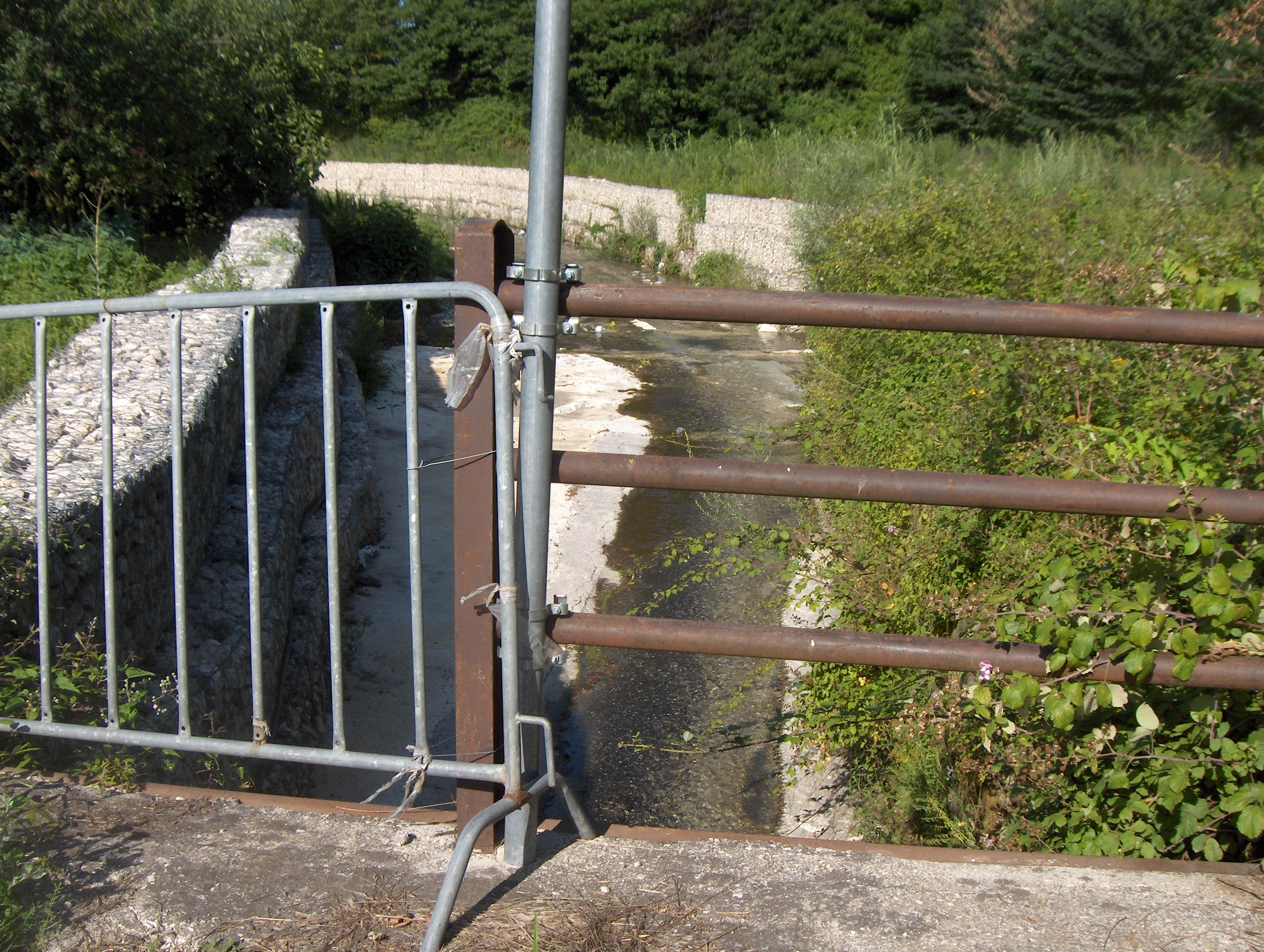 veduta del Fenestrelle dal ponticello a Monteforte Irpino,nel punto in cui l'affluente Rivarano sfocia nelle sue acque